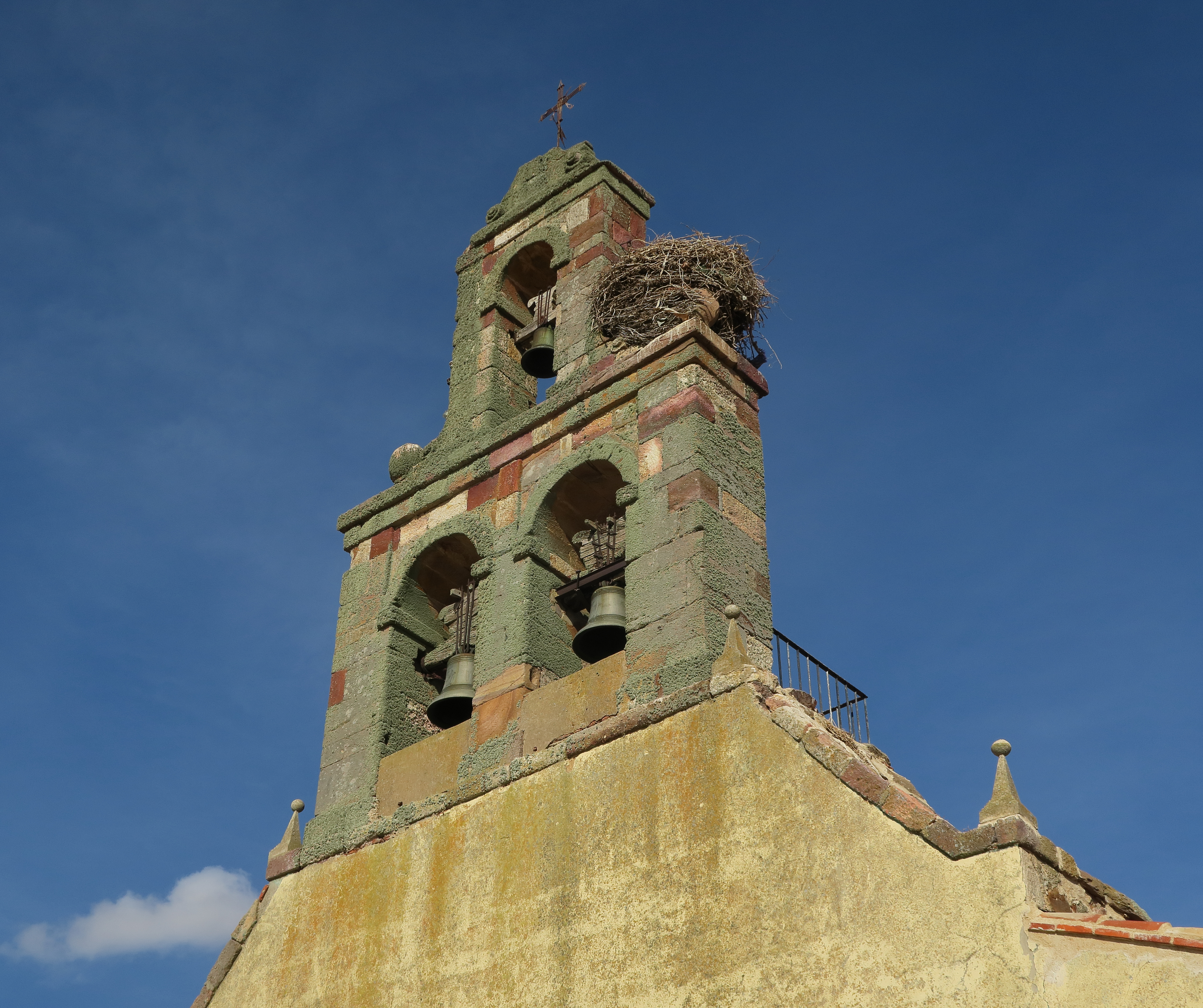 Piedrahíta de Castro, Iglesia de la Asunción, espadaña 02